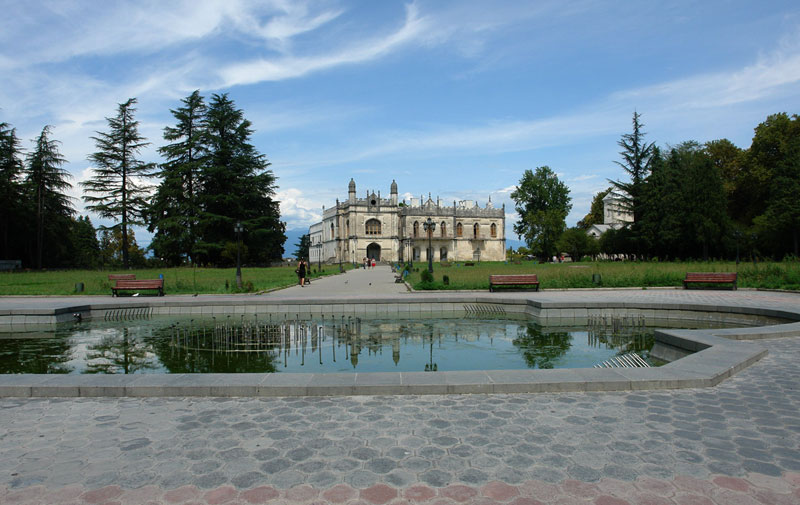 The Dadiani Palace Museum in Zugdidi, Samegrelo Region, Georgia.